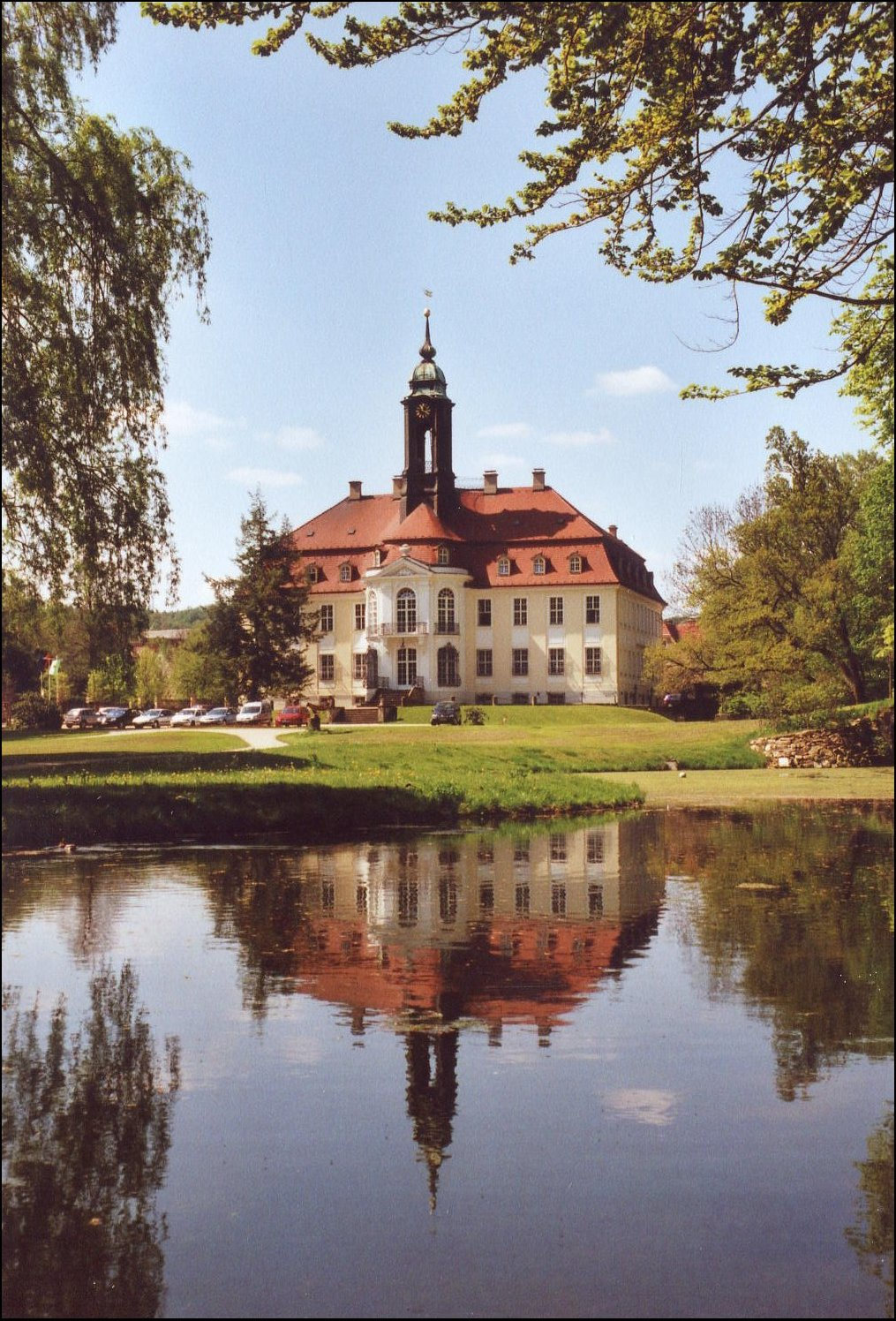 Reinhardtsgrimma: ländliches Barockschloss (1765-67), heute staatliche Fortbildungsstätte für Bedienstete der Agrarverwaltung des Freistaates Sachsen